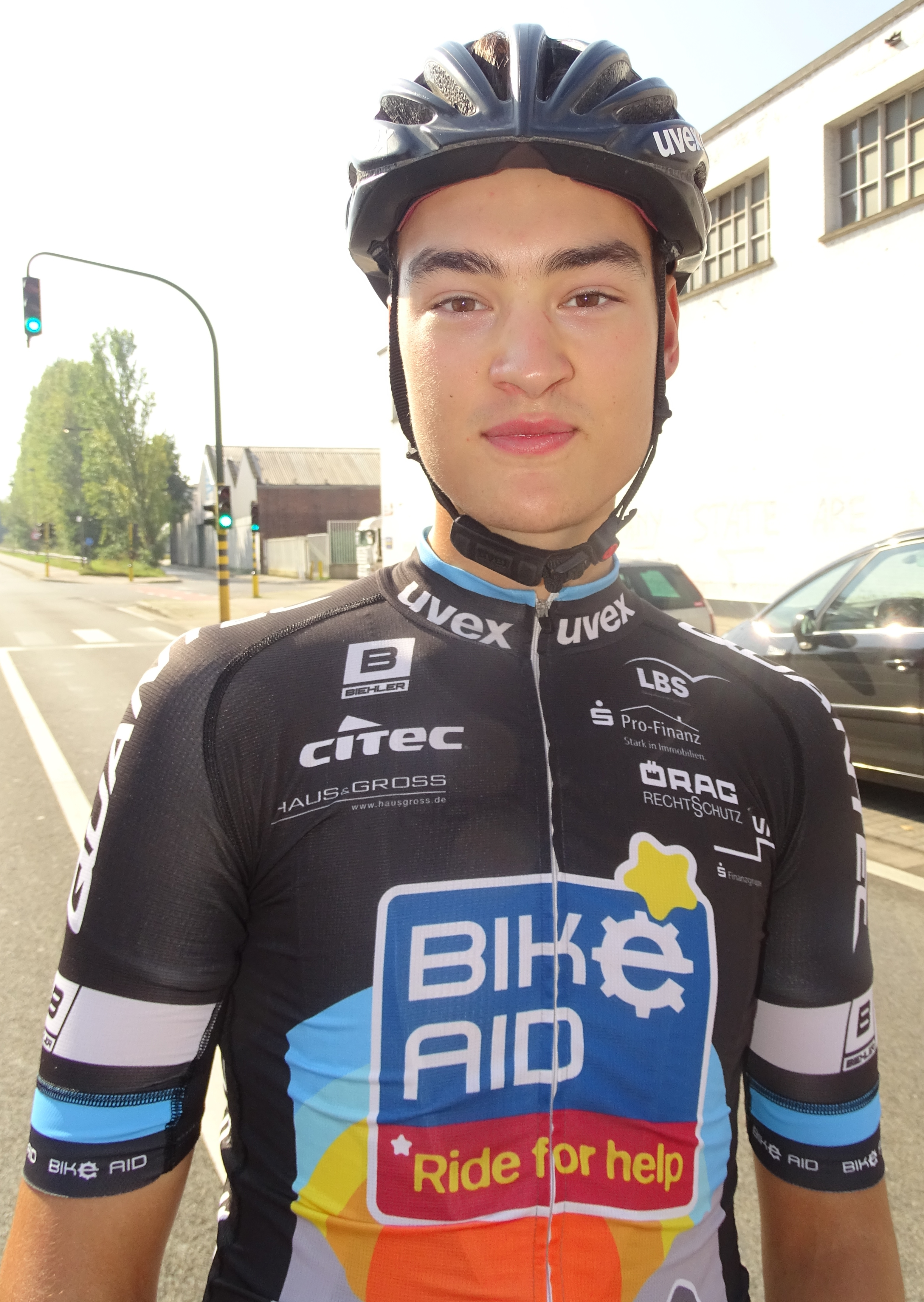 Reportage réalisé le dimanche 30 août à l'occasion du départ et de l'arrivée de la Coupe Sels 2015 à Merksem (Anvers), Belgique.